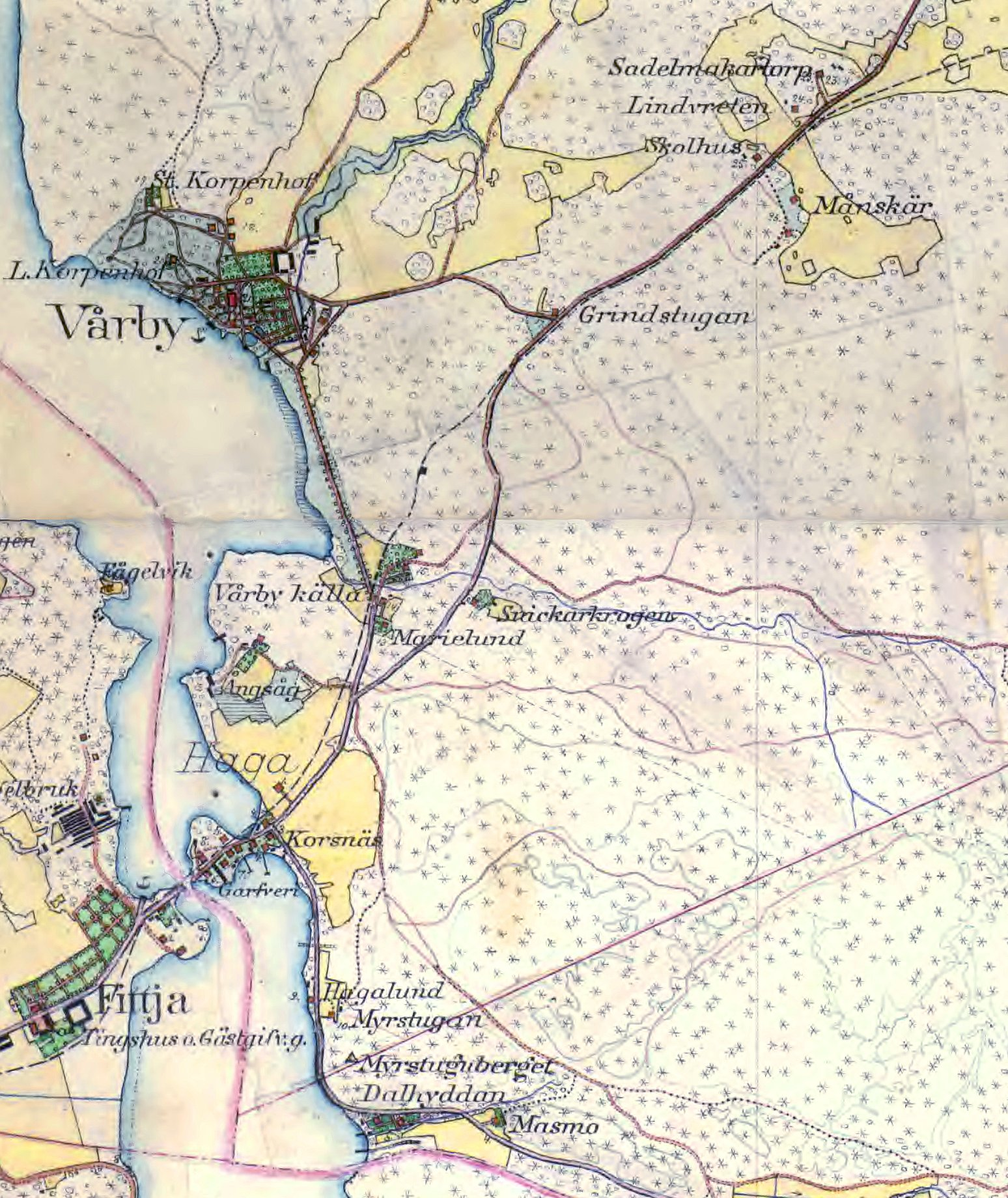 Vårby på Huddinge Härardskartan 1901